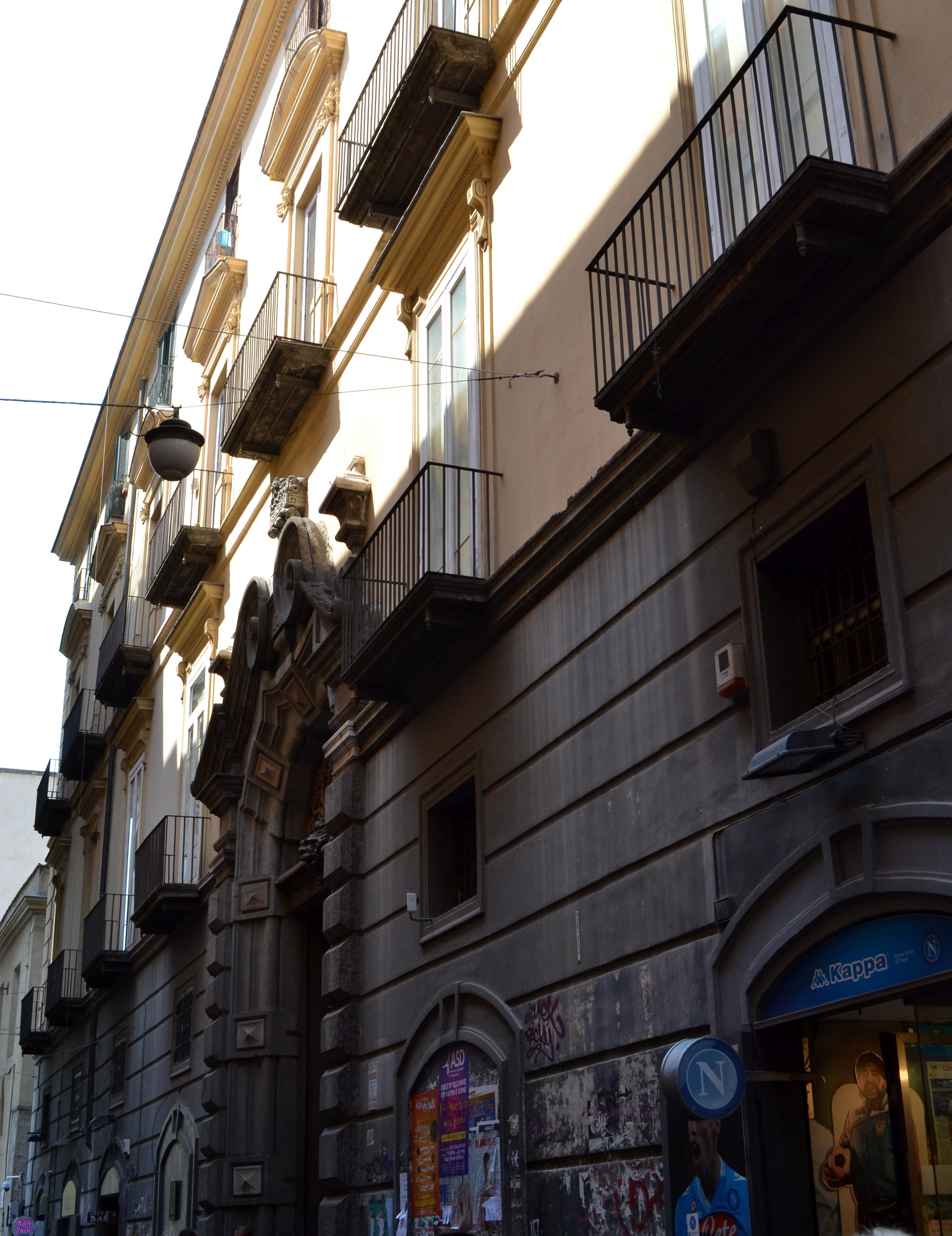 Palazzo Filomarino (facciata)